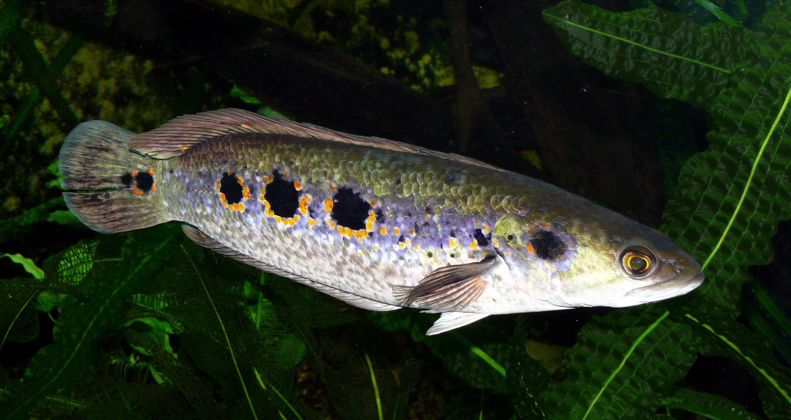 Punkt-Schlangenkopf (Channa_pleurophthalma)